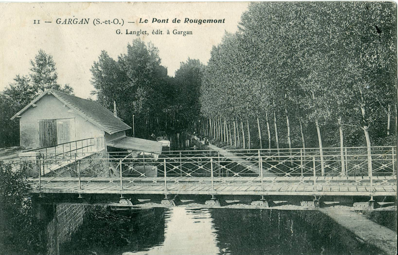 Carte postale ancienne éditée par LangletGARGAN : Le Pont de Rougemont